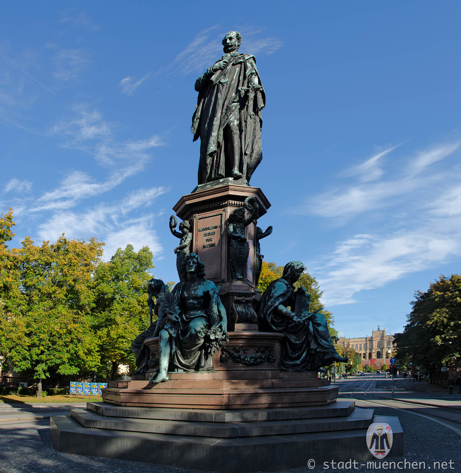 Denkmal für König Maximilian II. von Bayern (Maxmonument), geschaffen von Caspar von Zumbusch